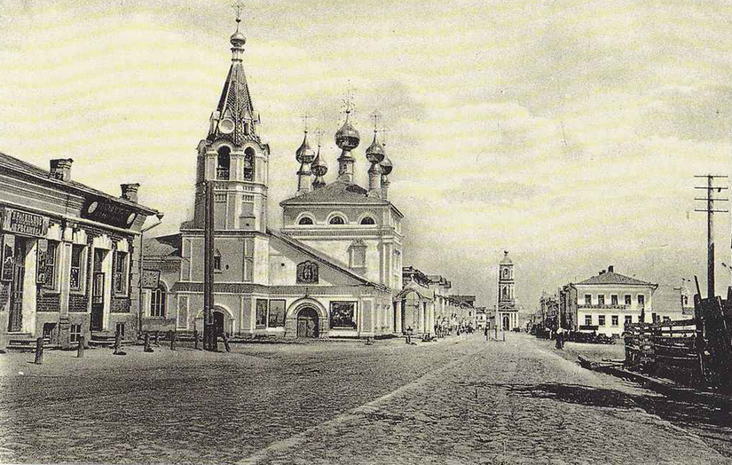 Вознесенская церковь в Муроме и улица Московская